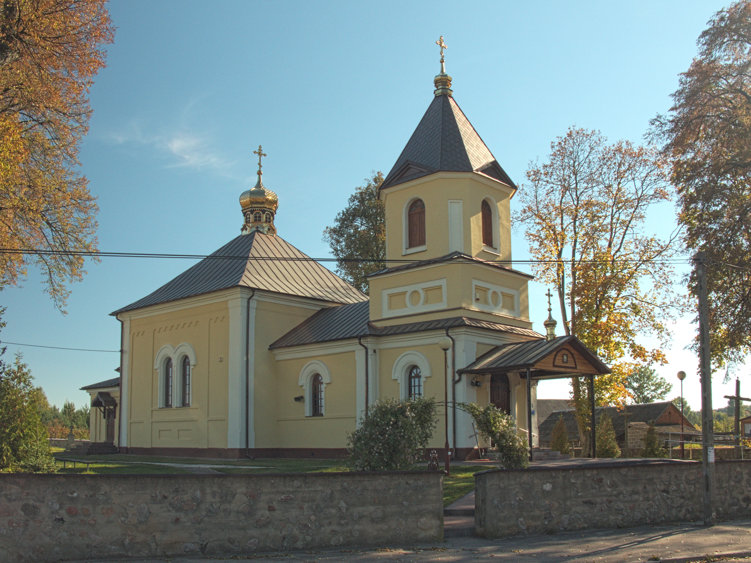 Cerkiew pw. św. Dymitra Sołuńskiego w Żerczycach.